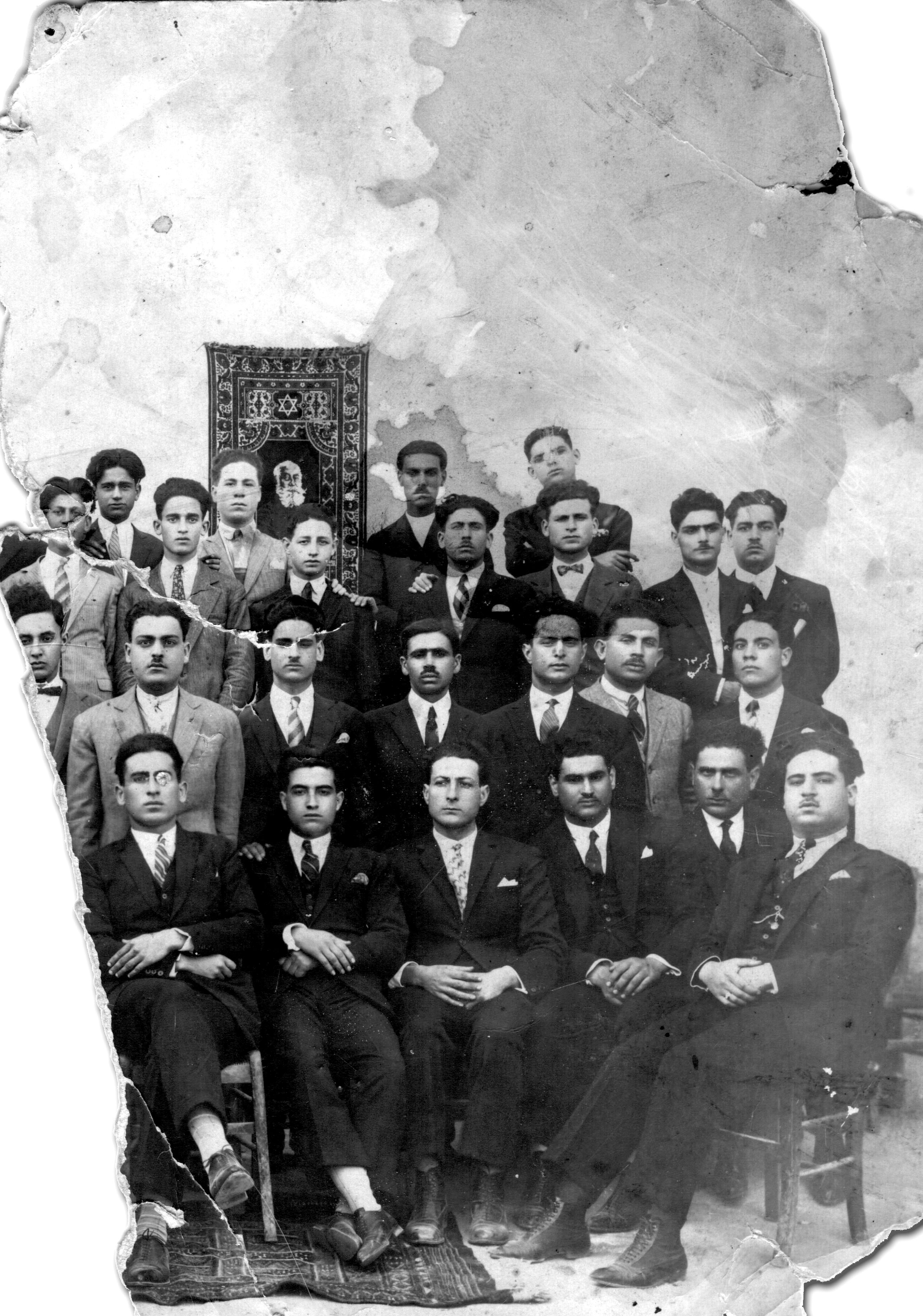 חברי ארגון "חוג הרצל"